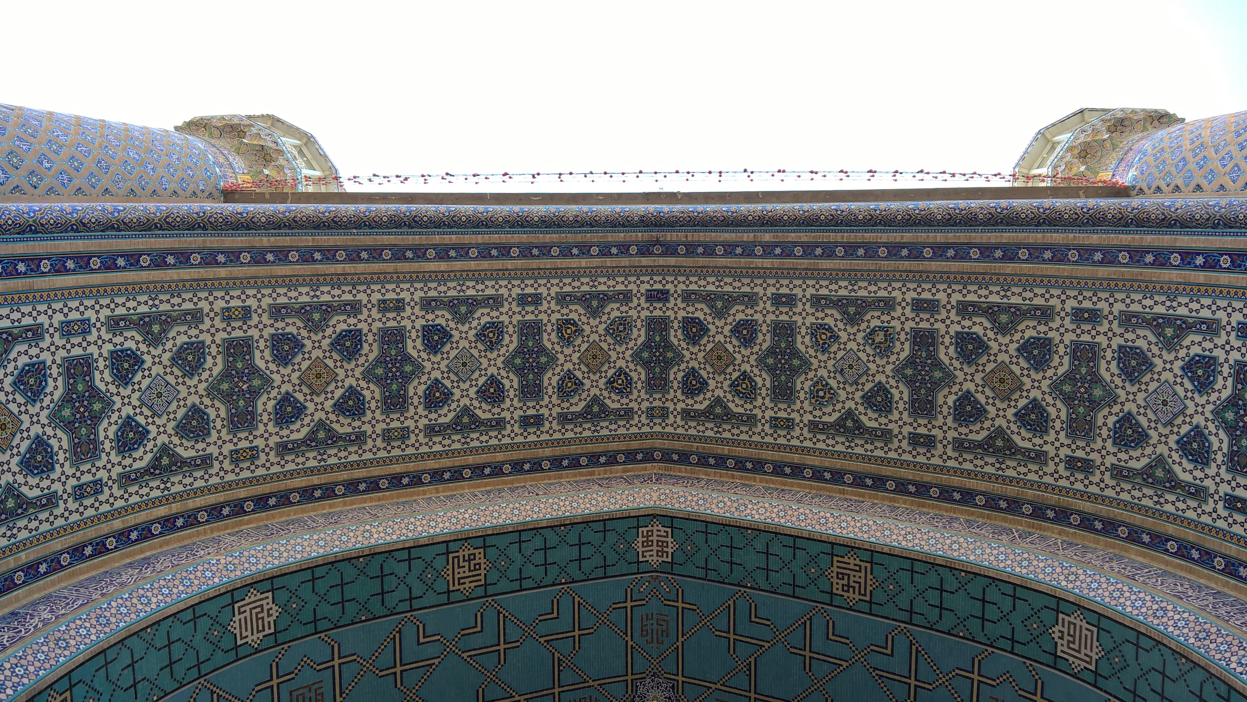 مجموعه حرم مطهر امام رضا (ع) - صحن ورودی مسجد گوهرشاد